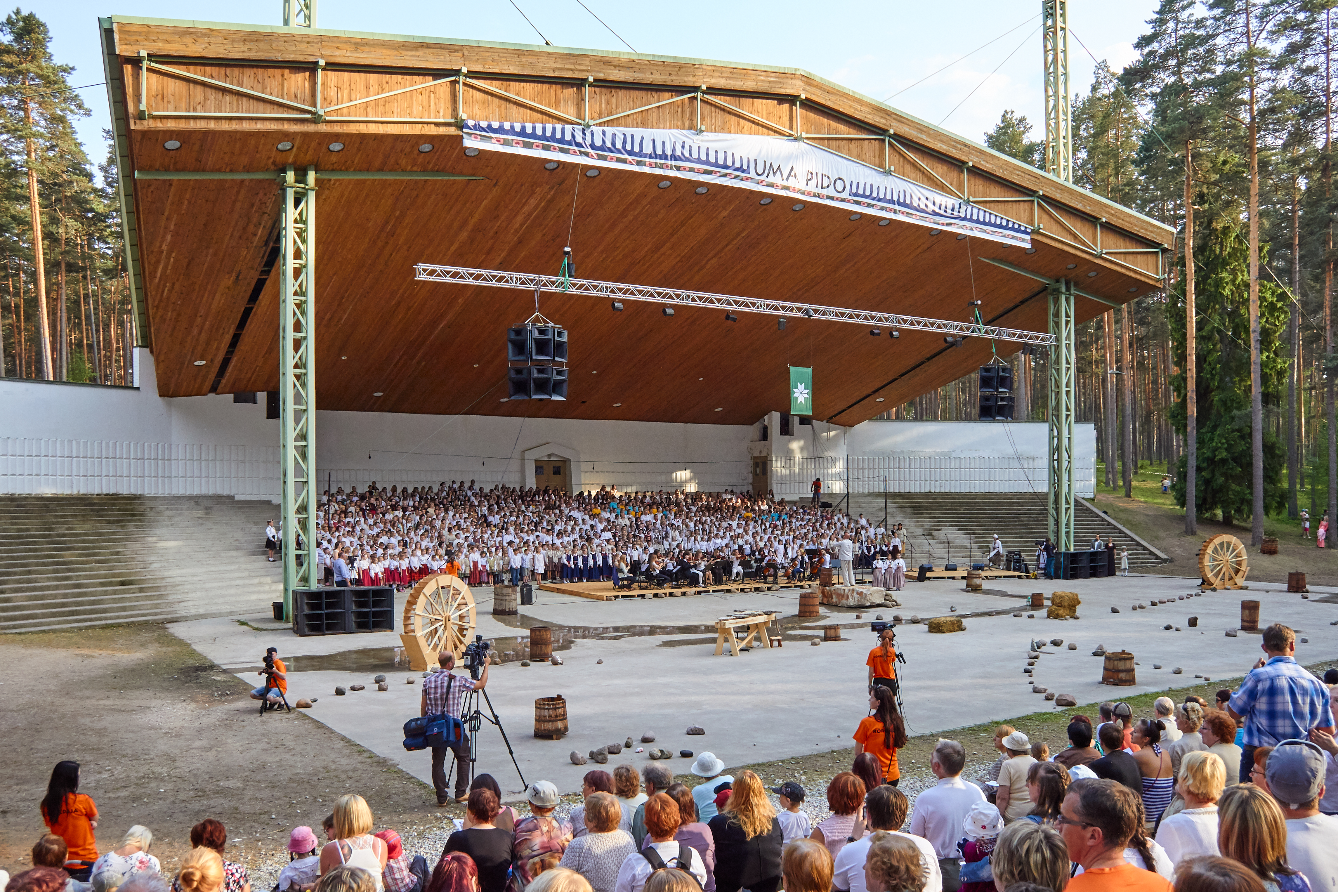 3. Uma Pido Võrus Kubija laululaval